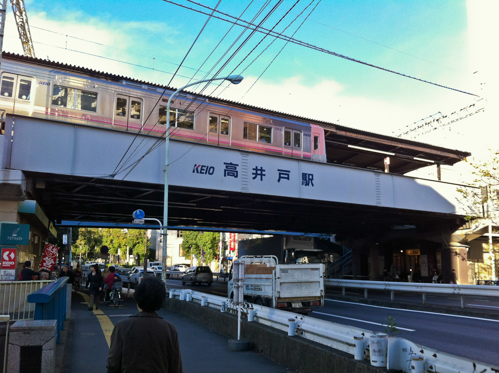 Tokyo, Japan 井王井之頭線高井戶站的高架月台與貫穿月台下方的環八通